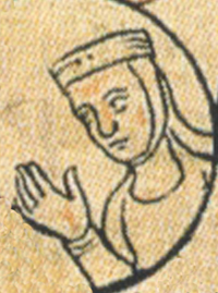 Bertha of Burgundy